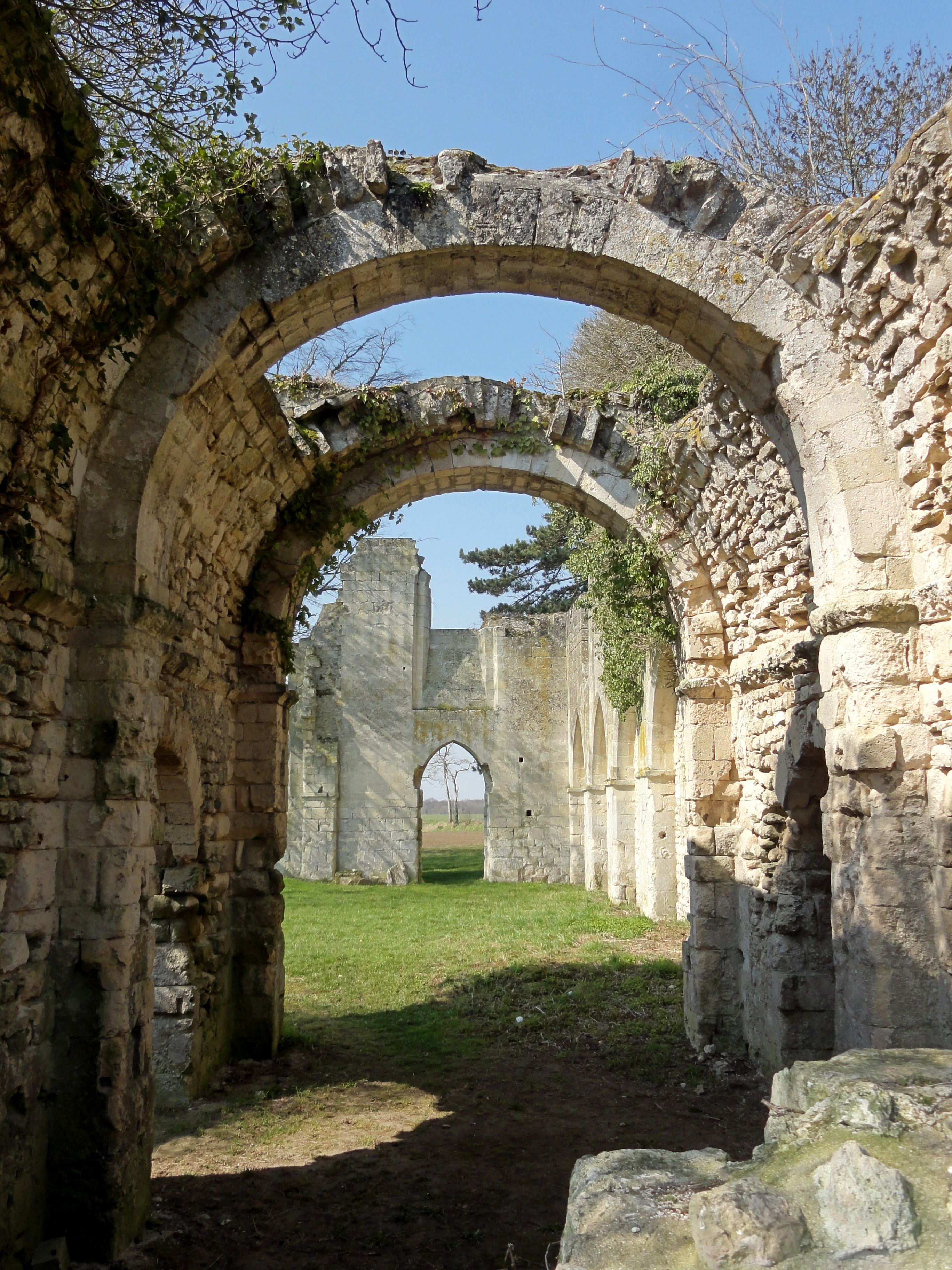 Vue générale intérieure depuis le chœur.